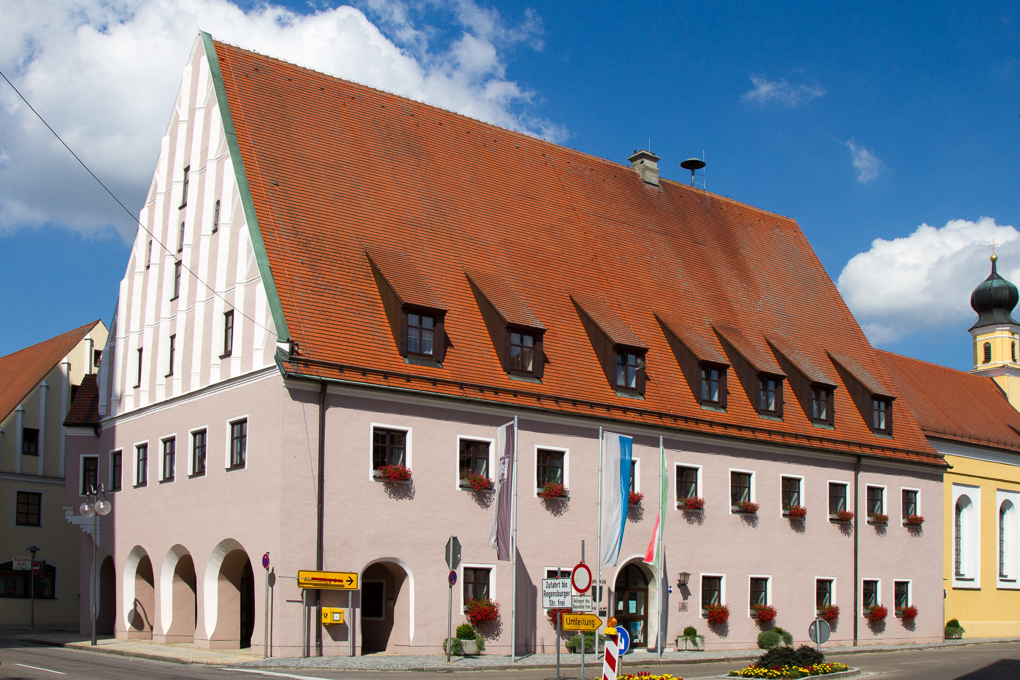 Rathaus, stattlicher zweigeschossiger Steilsatteldachbau, Westteil mit Laubengang, eingeschossiger Eckerker nach Nordwest, Ratssaal mit Balkendecke, spätgotisch, Ende 15. Jahrhundert, weitgehend erneuert 1978; mit historischer Ausstattung.This is a photograph of an architectural monument.